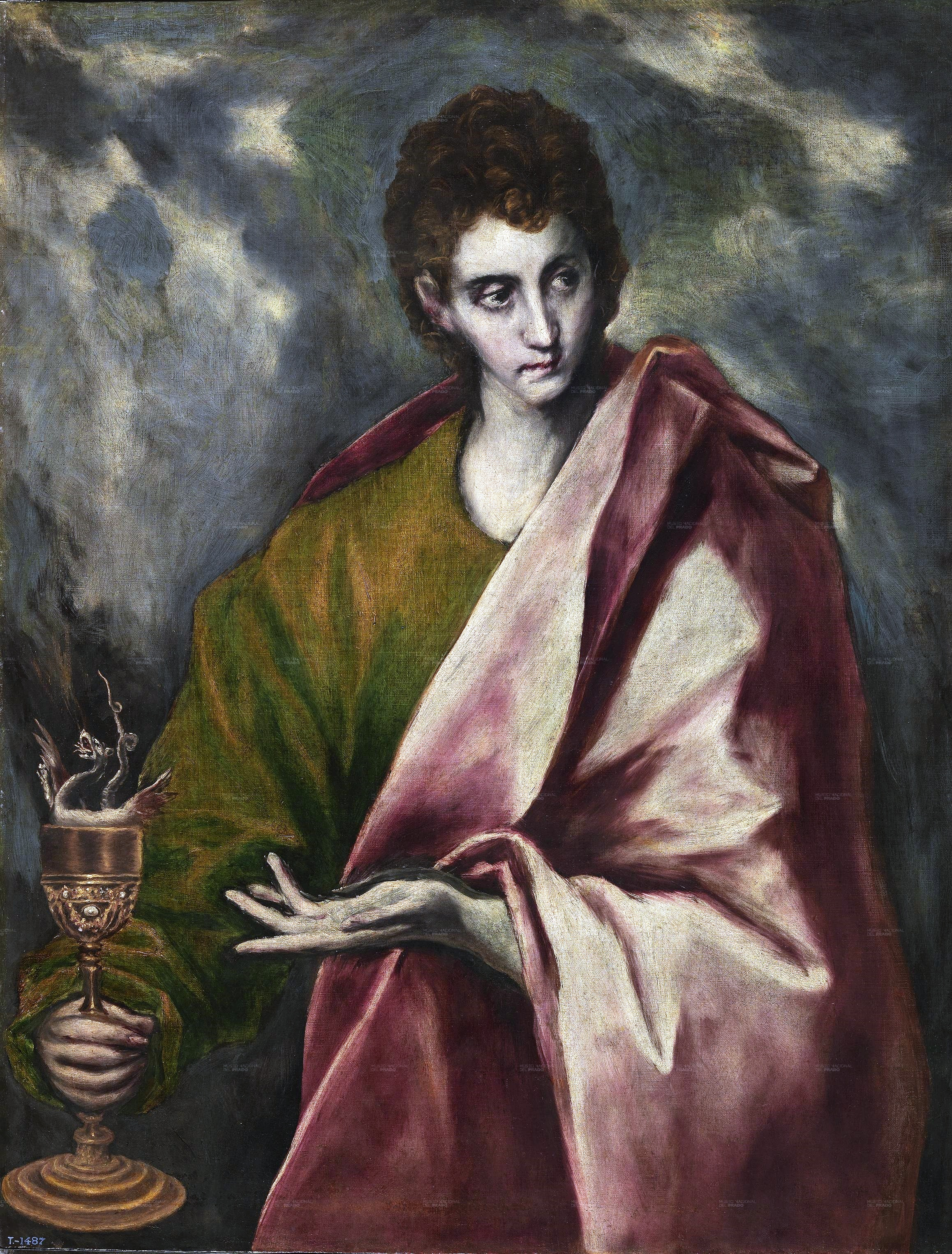 La obra representa a San Juan Evangelista.